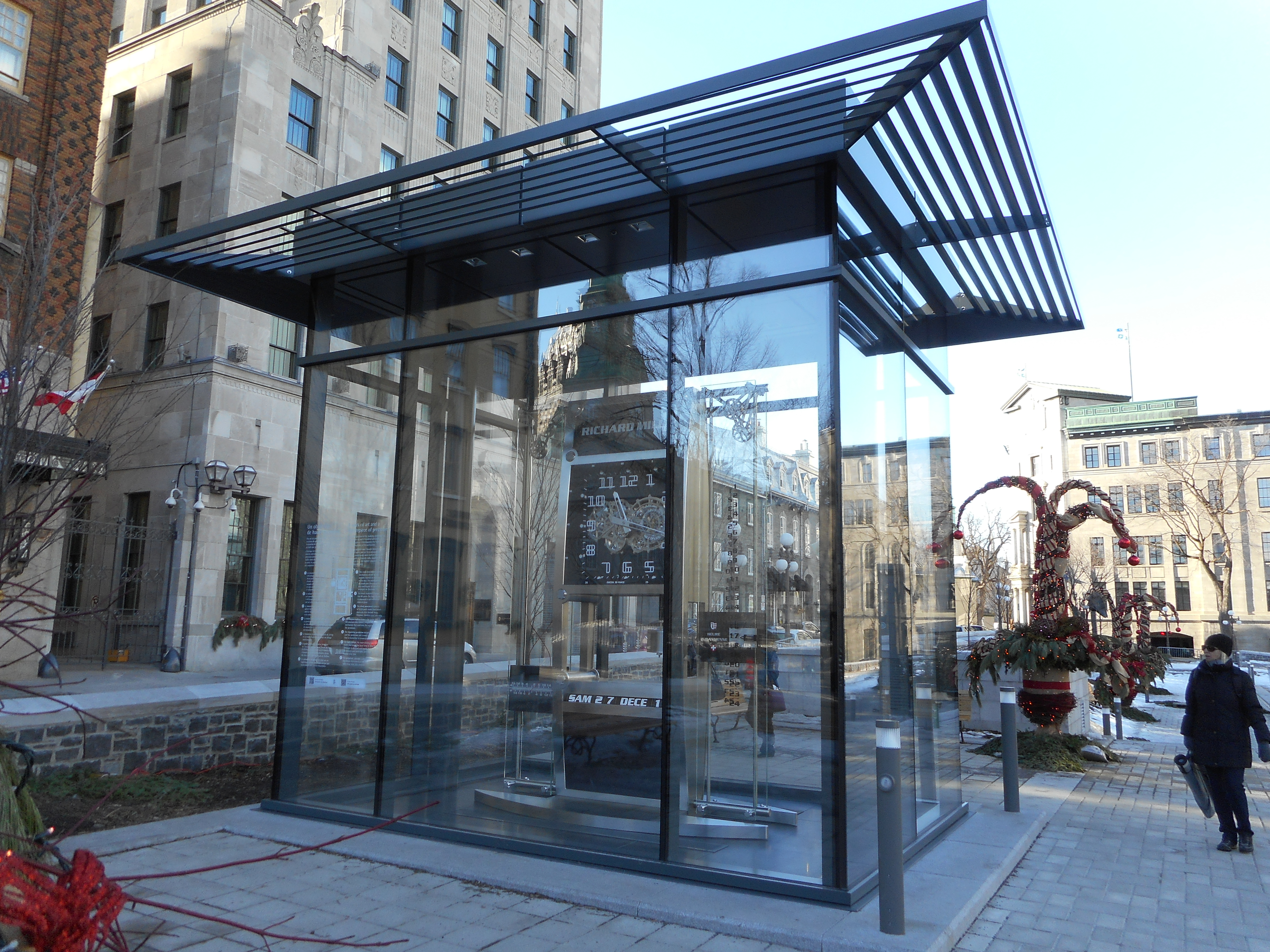 L'horloge du Jura, hôtel de ville de Québec « L’horloge monumentale réalisée en un seul exemplaire par Richard Mille a été offerte par la République et Canton du Jura, en Suisse, pour le 400e anniversaire de Québec. »